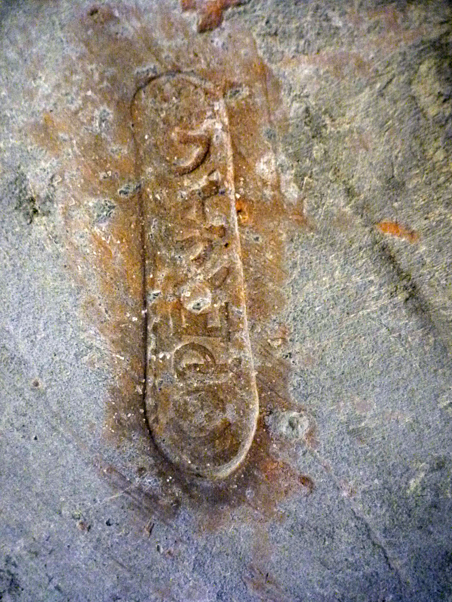 Stempel 'COPESAG' auf einen im Kastell gefundene Dachziegel, ausgestellt im römischen Museum Tulln